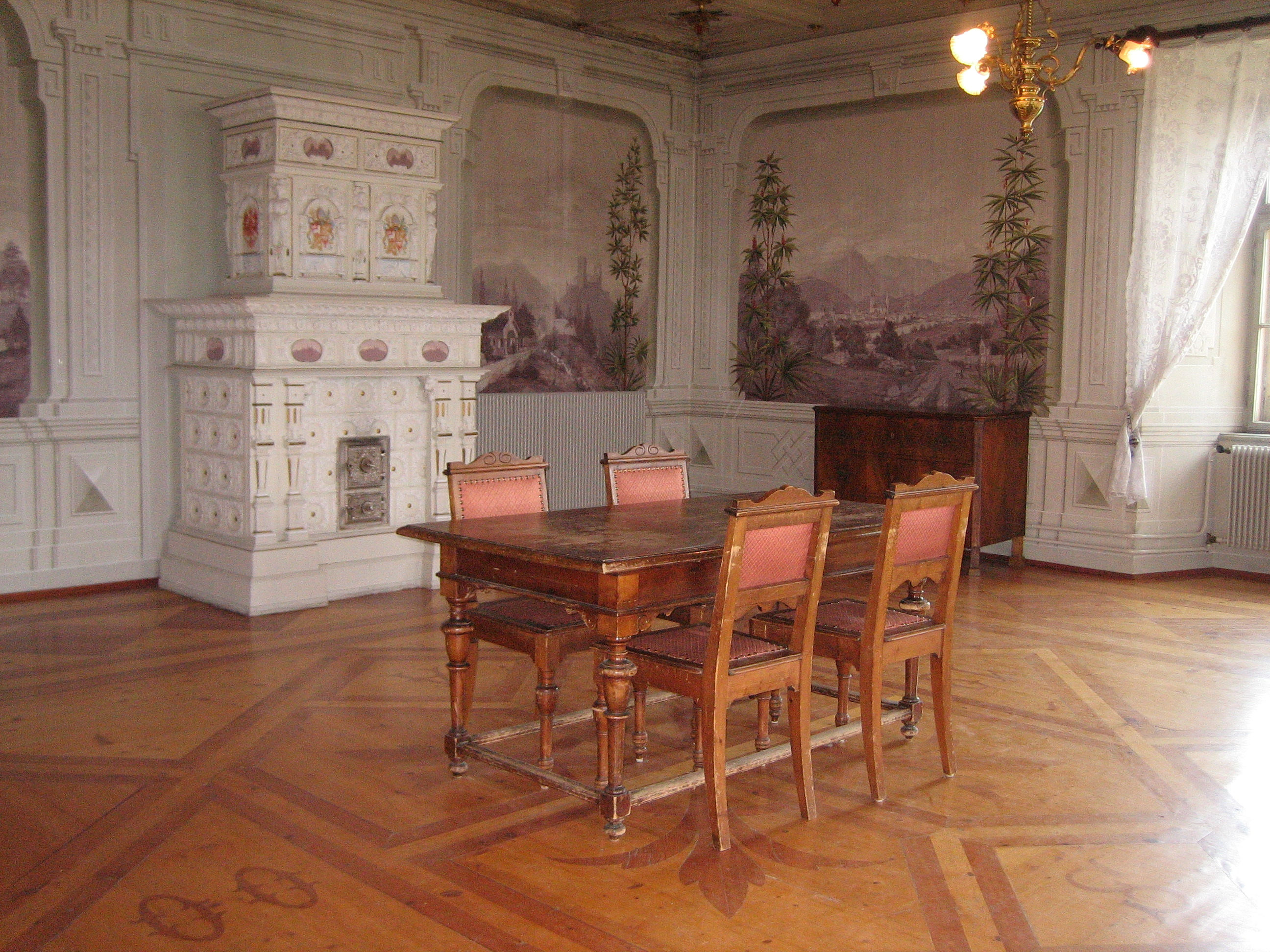 Fürstenzimmer im Schloss Bruneck